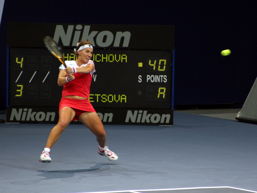 Svetlana Kuznetsova am Zurich Open 2006